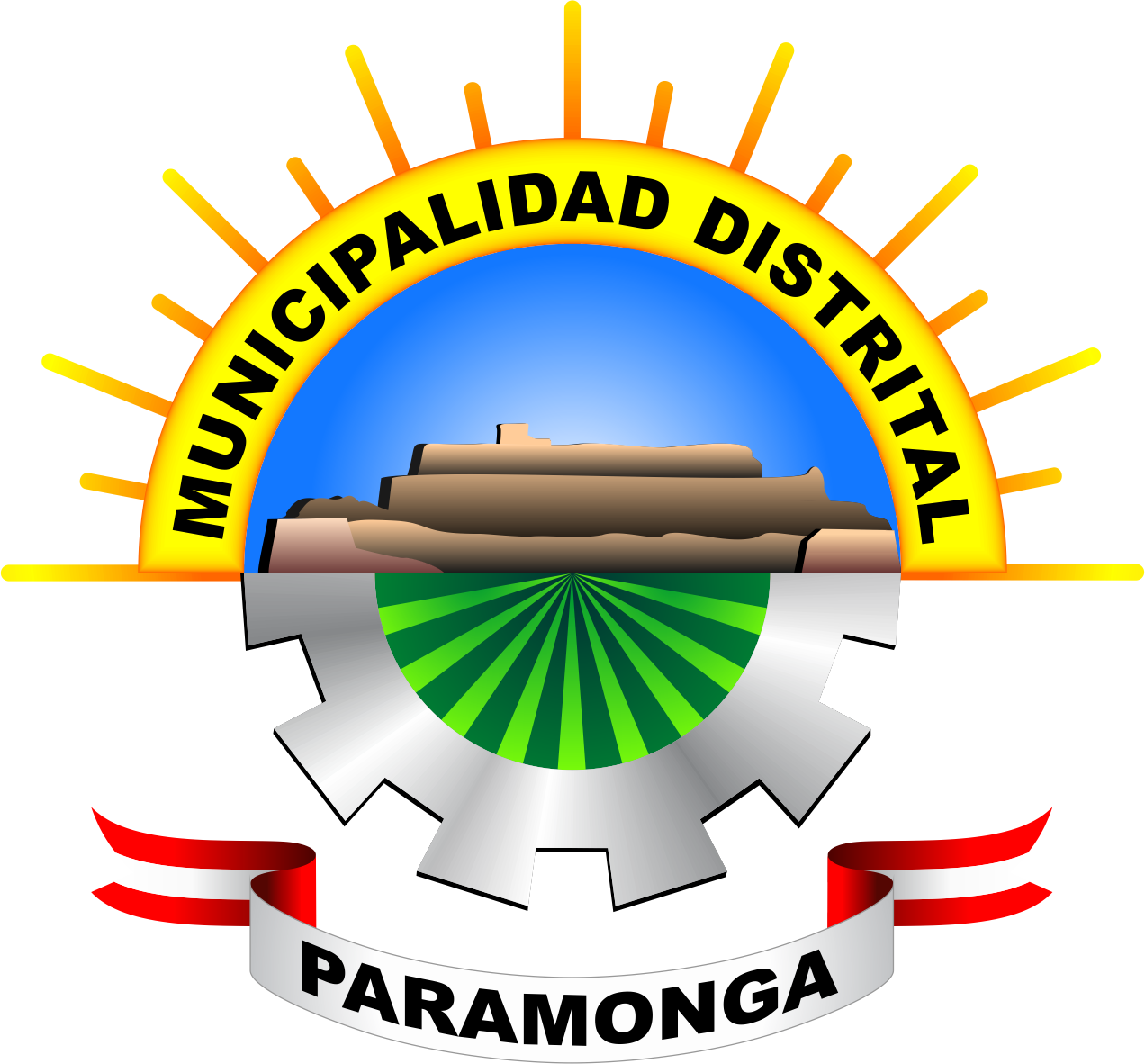 Distrito de Paramonga - Provincia de Barranca - Región Lima